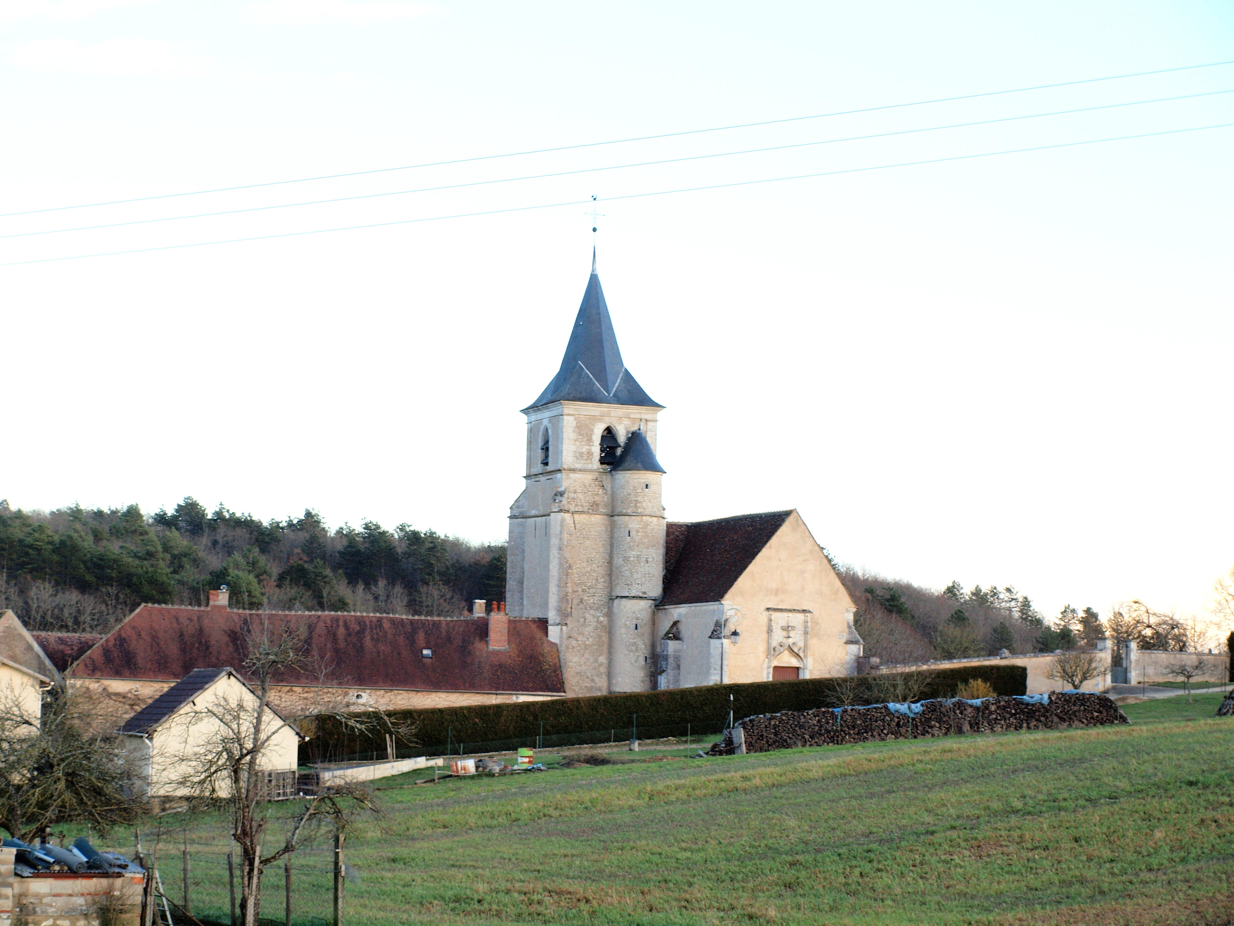 Fontenay-sous-Fouronnes (Yonne, Nièvre)